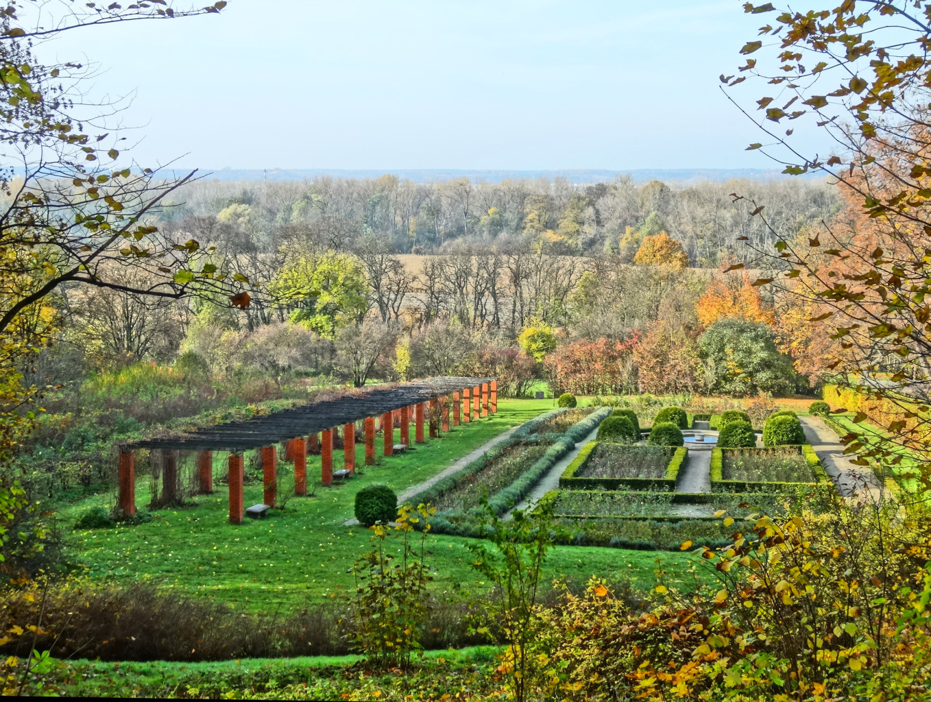 Zespół pałacowo-parkowy w Ostromecku k. Bydgoszczy - część dolna u podnóża pałacu Mostowskich